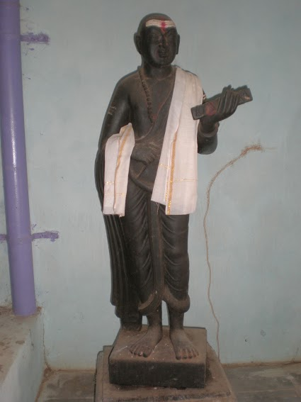 నేను బమ్మెర గ్రామం 2007 డి,ంబరు 3వ తారీఖున వెళ్ళినప్పుడు ఎన్73 నోకియా ఫోనుతో తీసుకొన్న ఫొటో ఇది. పోతన గారు తెలుగులో అత్యుత్తమ రచయిత. వారి విగ్రహం ఇది. V Sambasiva Rao (talk) 12:54, 24 December 2013 (UTC)